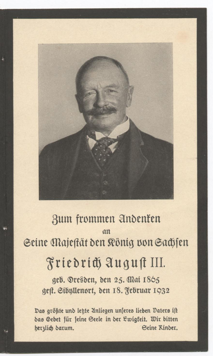 König Friedrich August III. von Sachsen